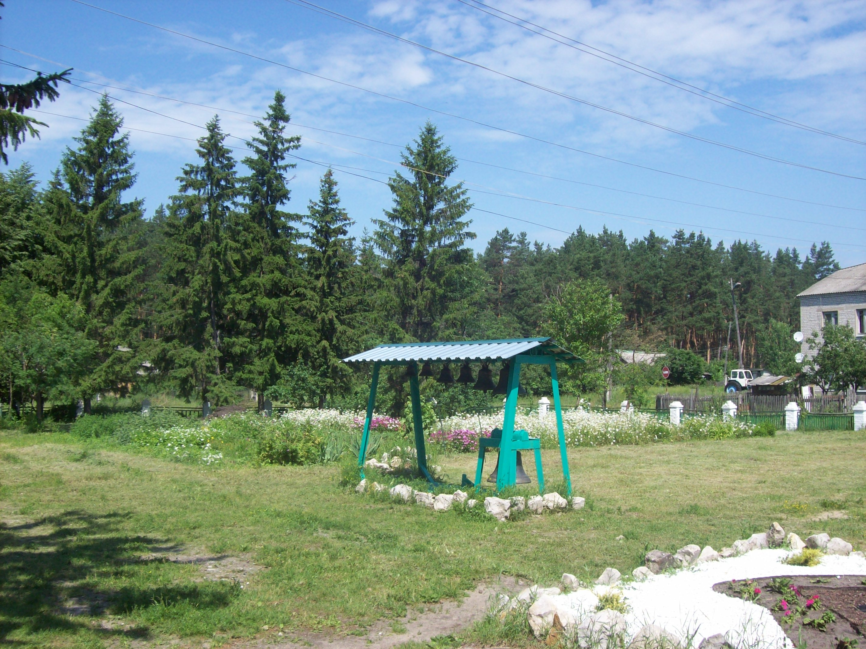 Воронежская область. На территории Толшевского Спасо-Преображенского монастыря